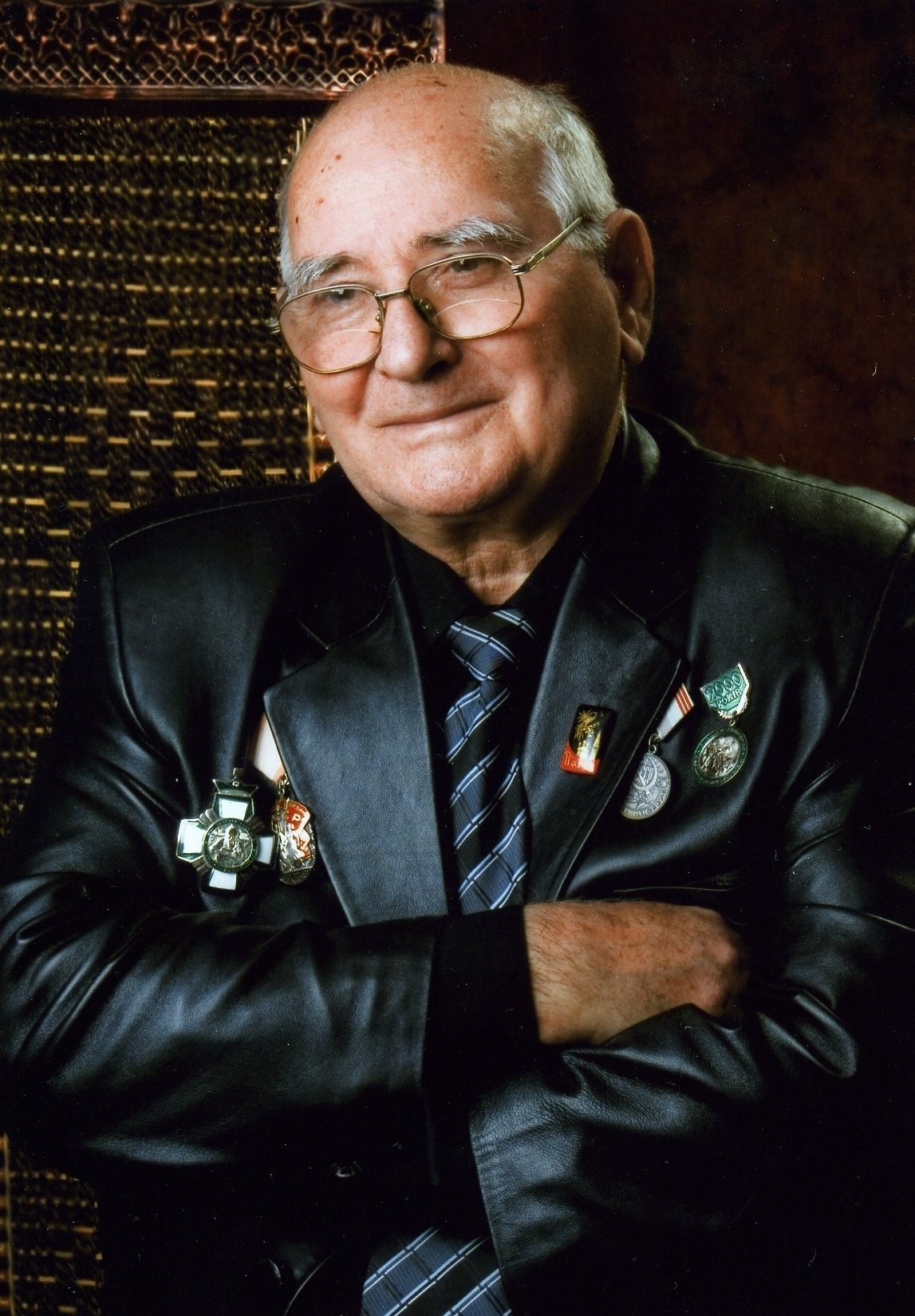 Продан Марк Дмитриевич